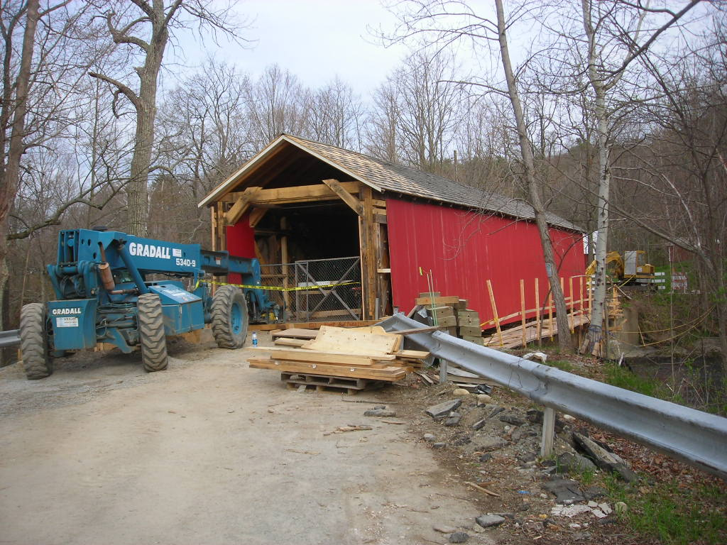 Eagleville Covered Bridge.